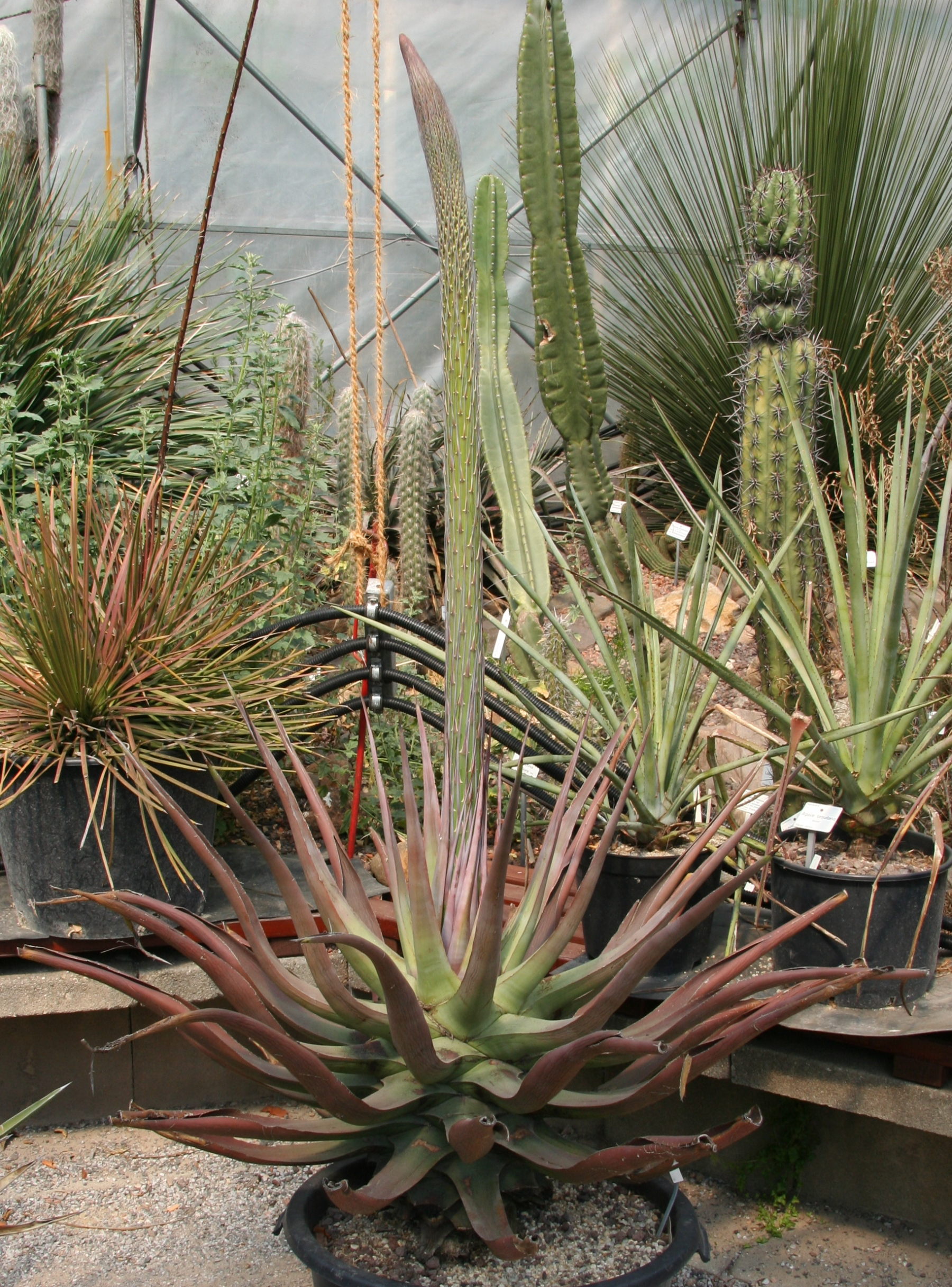 Agave vilmoriniana im Botanischen Garten Dresden